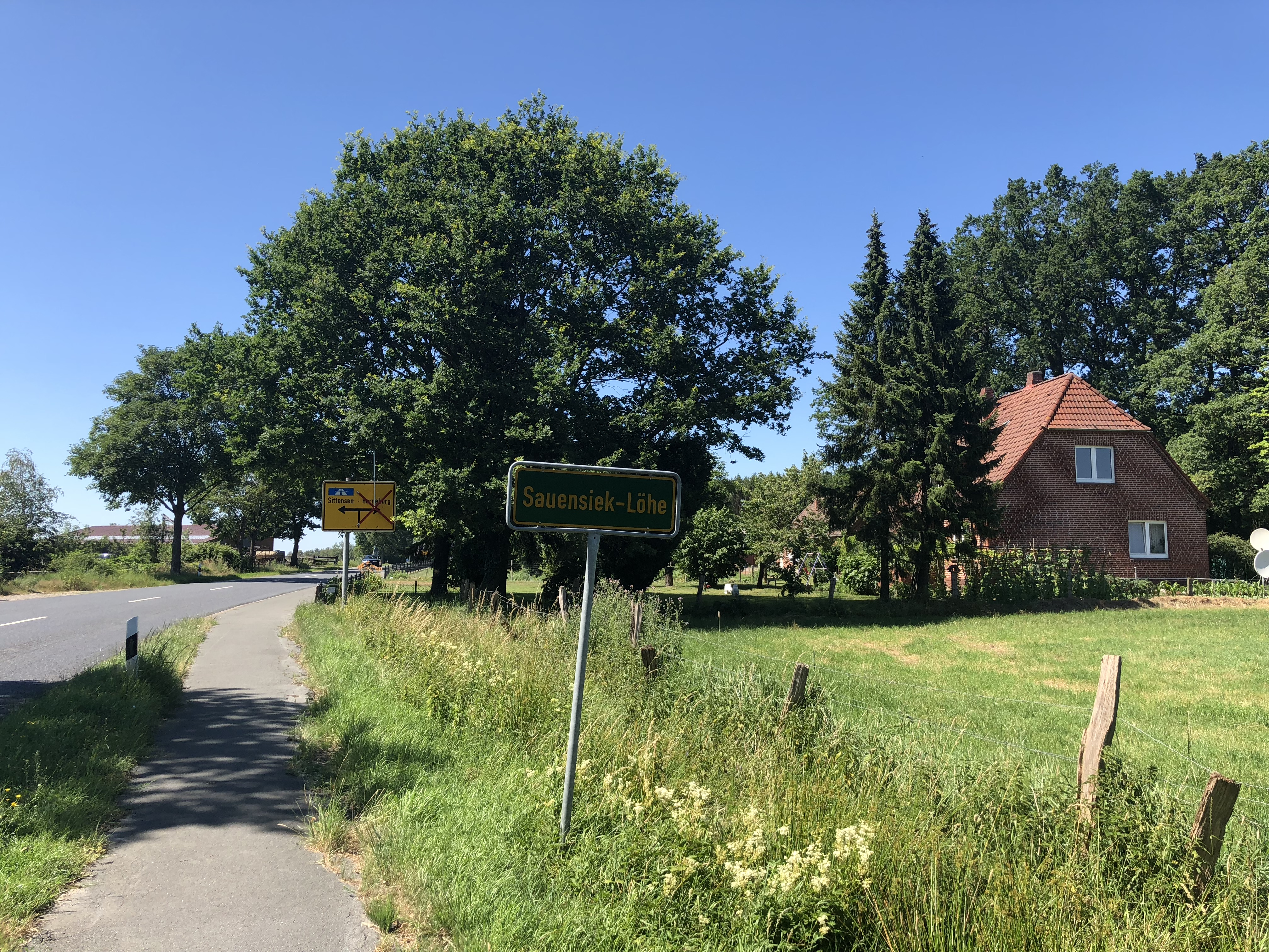 Oortsschild Löh